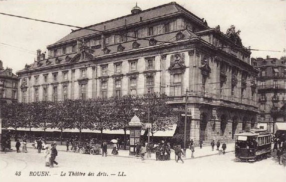 Le théâtre des Arts de Rouen, détruit et remplacé depuis.